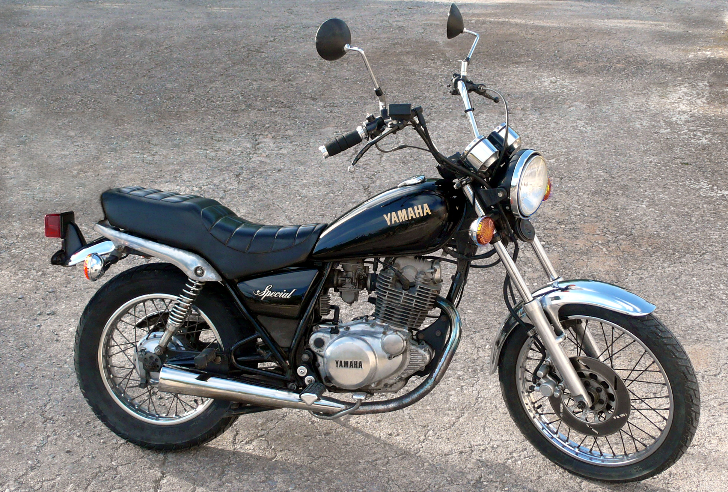 Yamaha SR 250 Special (1991)